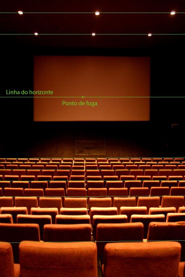 Análise da imagem para um artigo